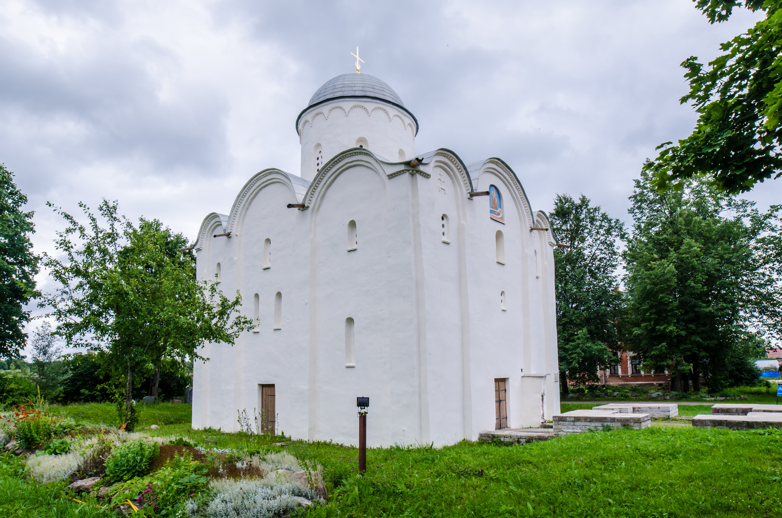 Собор Успенский (церковь Успенская): проспект Волховский, Старая Ладога, Волховский район, Ленинградская область